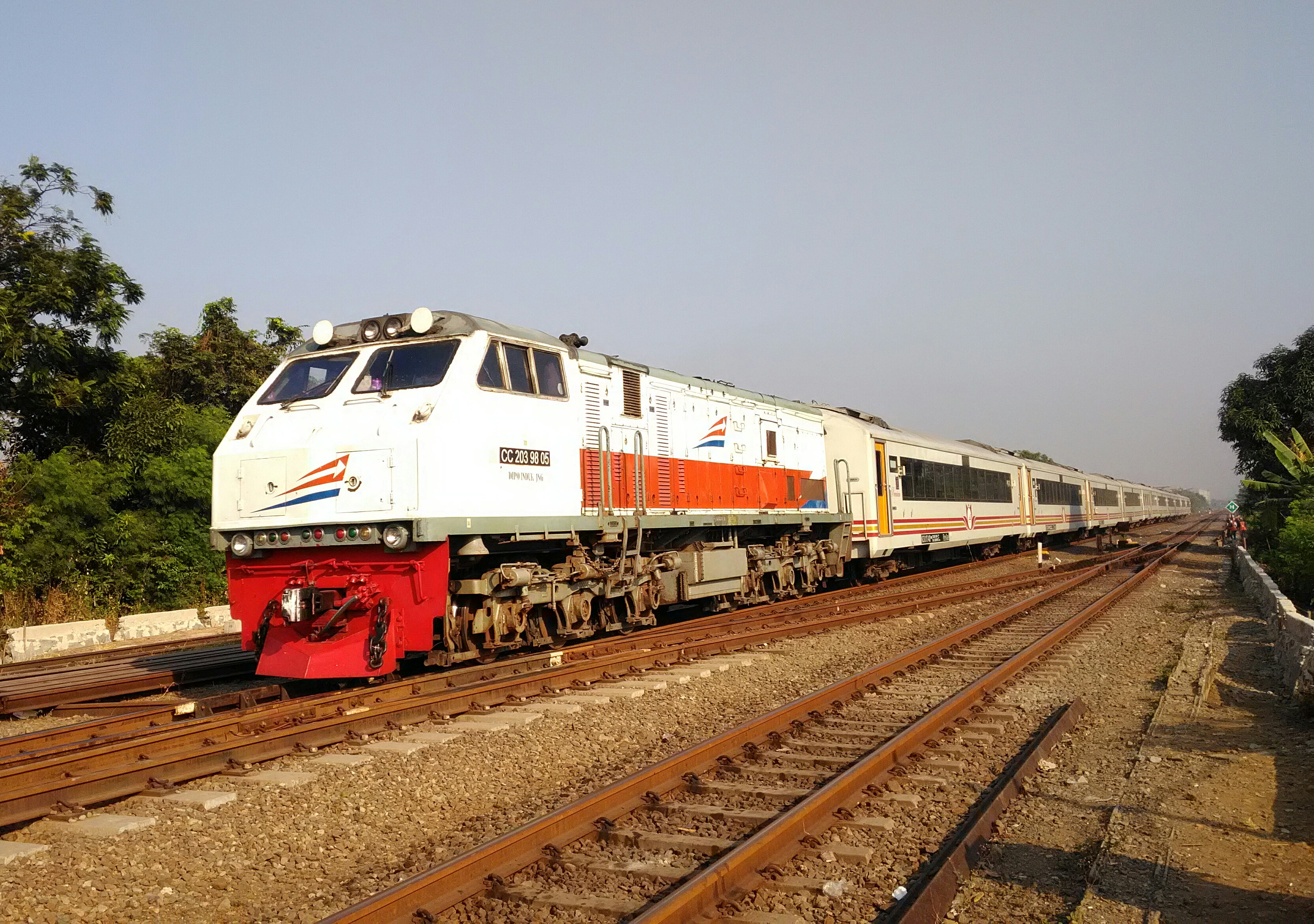 Kereta api Tawang Jaya Premium